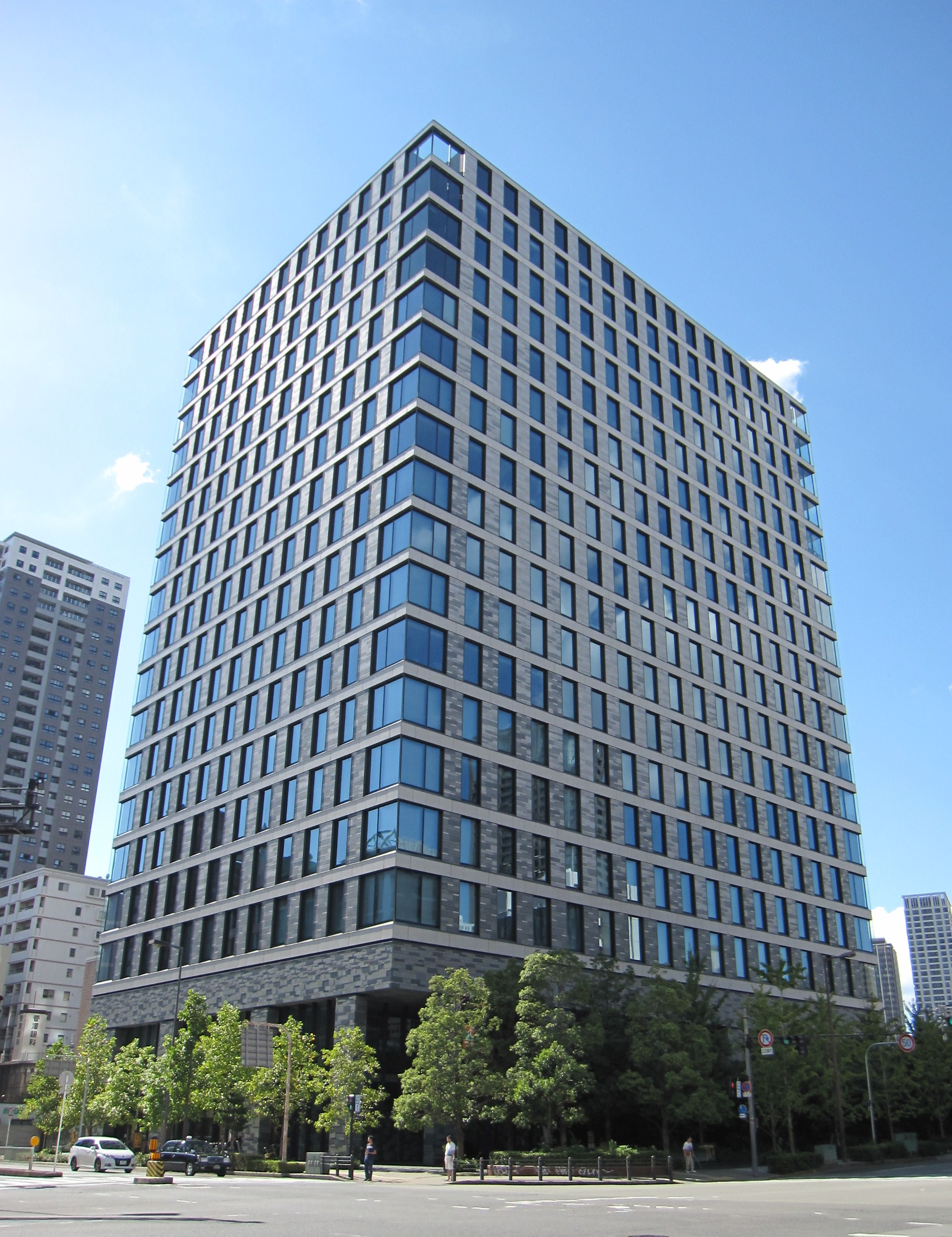 土佐堀ダイビル